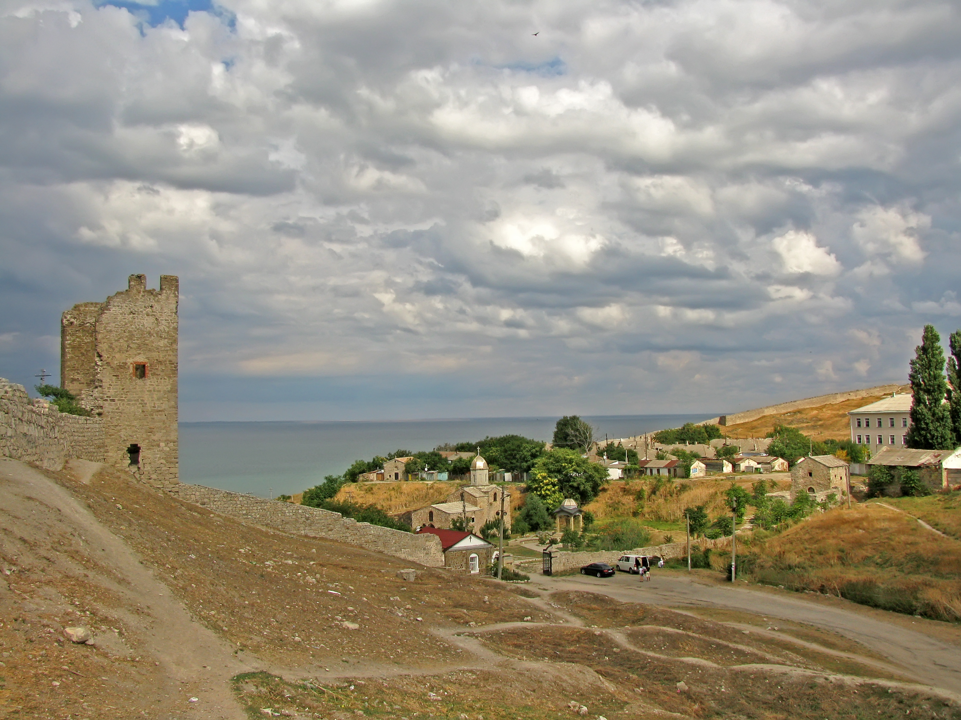 Генуезька фортеця (Карантин), Феодосія, південно-східна частина міста